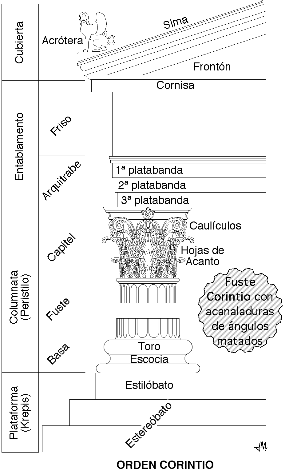 ORDEN CORINTIO Plataforma escalonada (krepis) Columnata (peristilo) Fuste con acanaladuras de aristas matadas Capitel Hojas de Acanto Caulículos o pequeñas volutas Ábaco Entablamento Arquitrabe dividido en tres bandas (platabandas) Friso corrido Cornisa Cubierta Frontón Vertiente o Sima